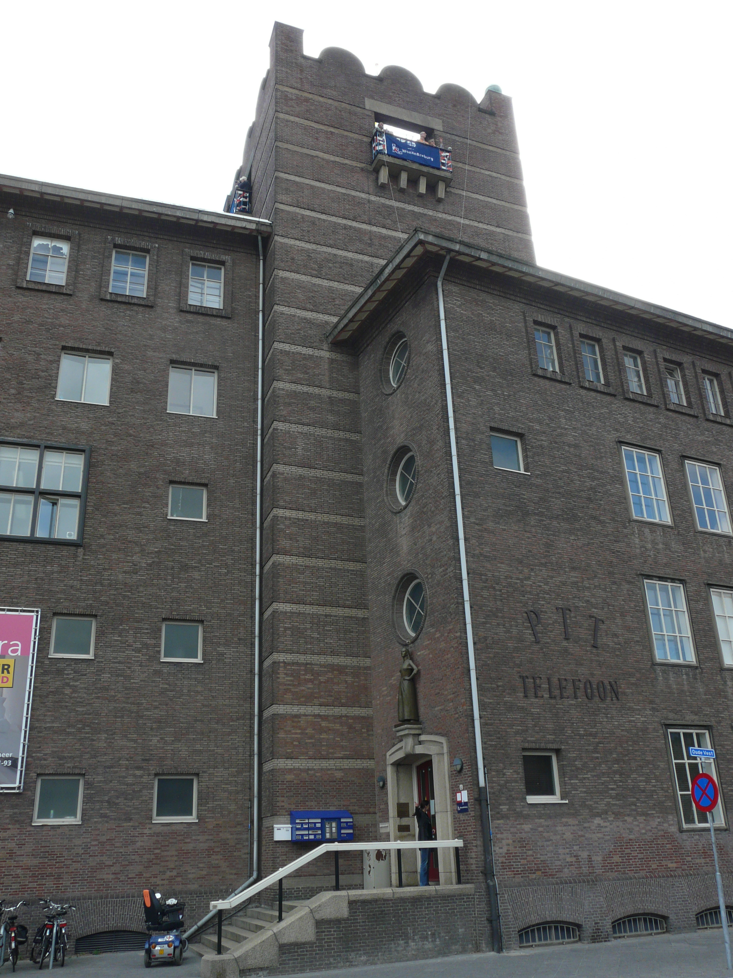 Zicht op het voormalig Postkantoor gevestigd aan de Oude Vest in Breda Centrum